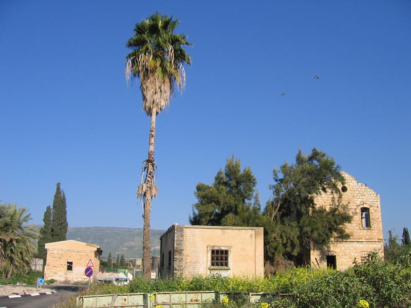 תחנת רכבת העמק בצמח. תמונה לכיוון מזרח. צילמתי והעלתי במרץ 2006. אסף.צ 15:28, 11 מרץ 2006 (UTC)